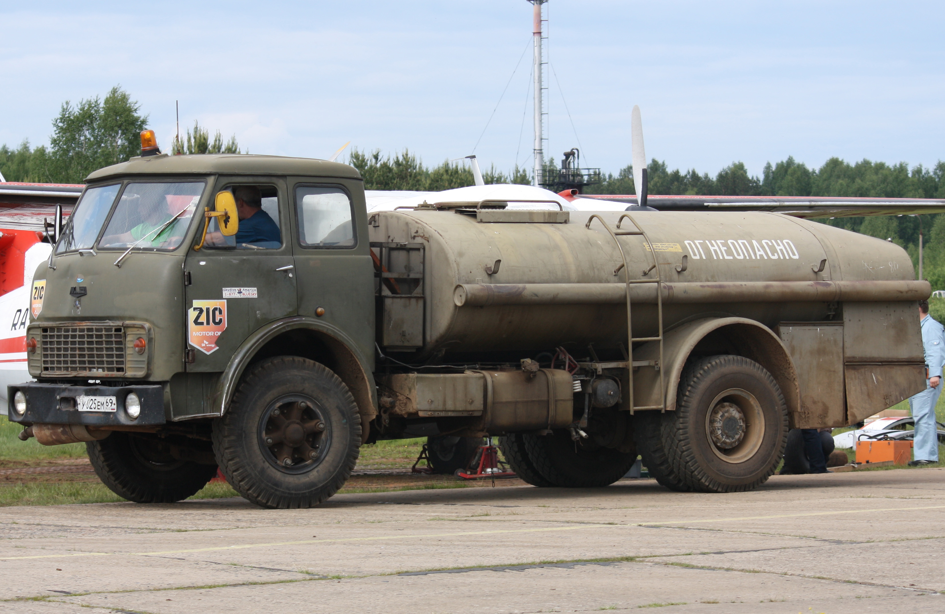 Палівазапраўшчык ТЗА-7,5-5334 на базе МАЗ-5334